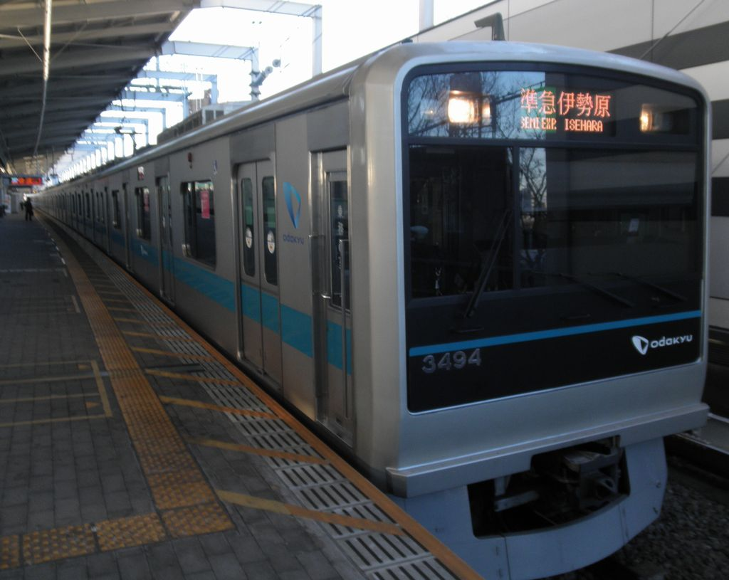 代々木上原駅に停車中の3000形10両固定編成による準急伊勢原行